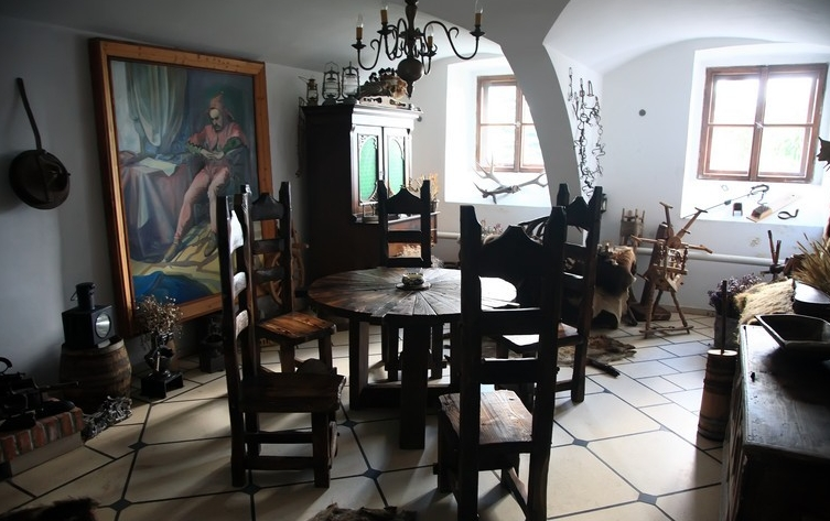 Osieka – wieś w woj. warmińsko-mazurskim, w powiecie bartoszyckim, w gminie Bartoszyce